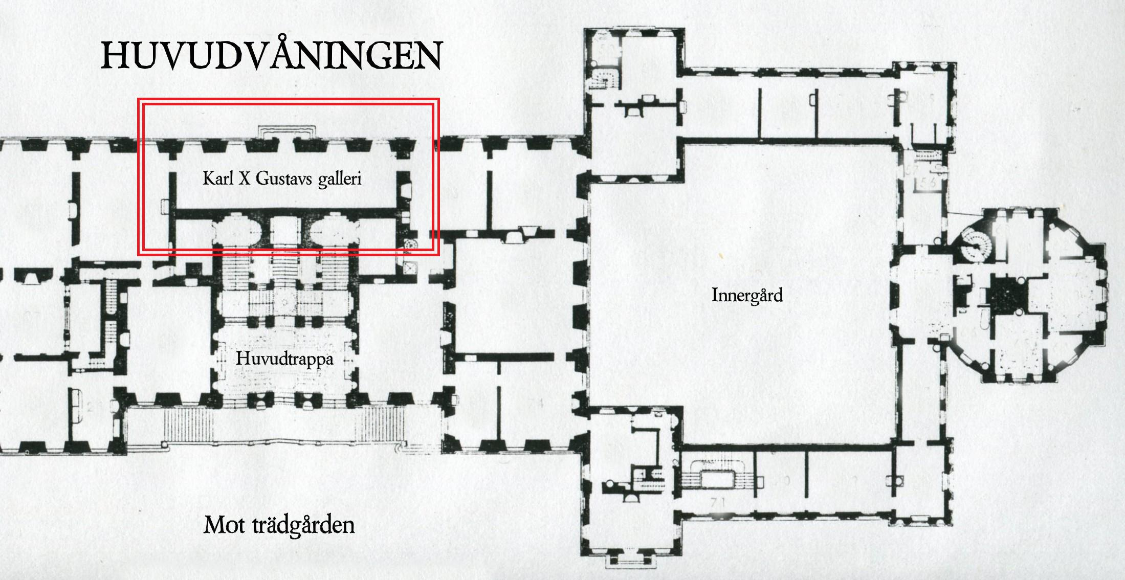 Drottningholms slott, planritning, huvudvåning, Karl X Gustavs galleri